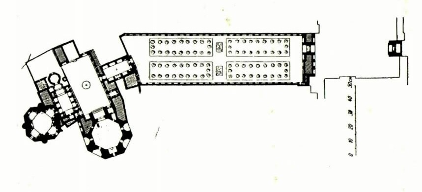 Şeyx Səfi kompleksinin planı